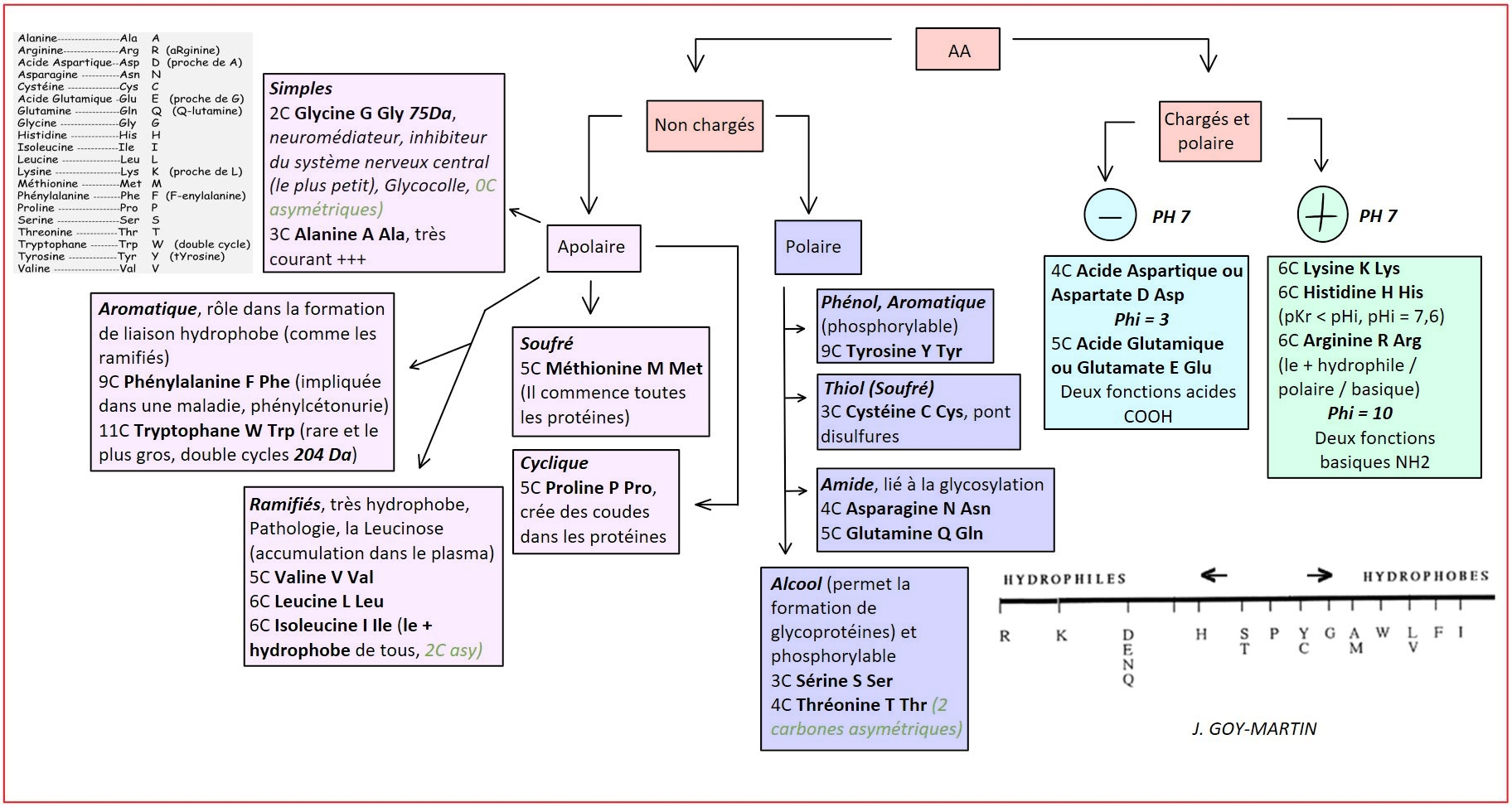 Diagramme organisant toutes les 20 acides aminés protéinogènes (exception des exotiques, la pyrrolysine et la sélénocystéine) de la biochimie..